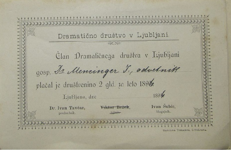 Sprejemnica pisatelja Janeza Mencingerja, ki je bil član Dramatičnega društva v Ljubljani.